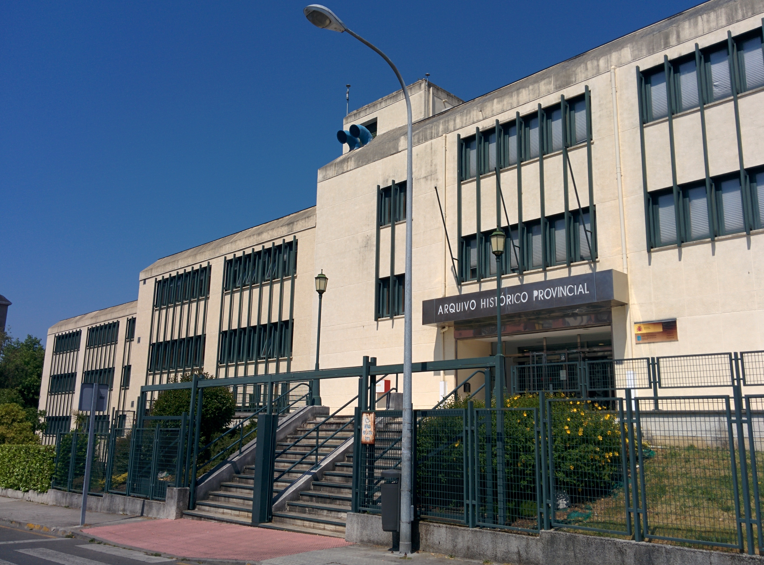 Fachada del Archivo Histórico Provincial de Lugo.